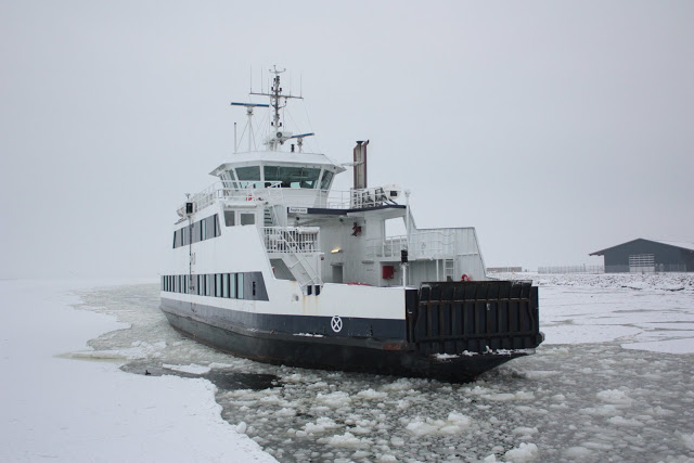 Færgen sejler i Holbæk Fjord mellem Holbæk Havn og Orø Havn